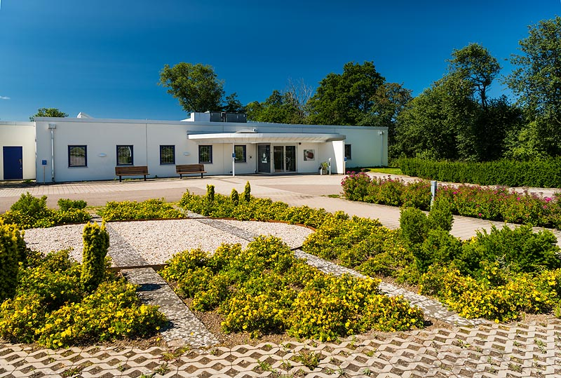 Mjellby konstmuseum